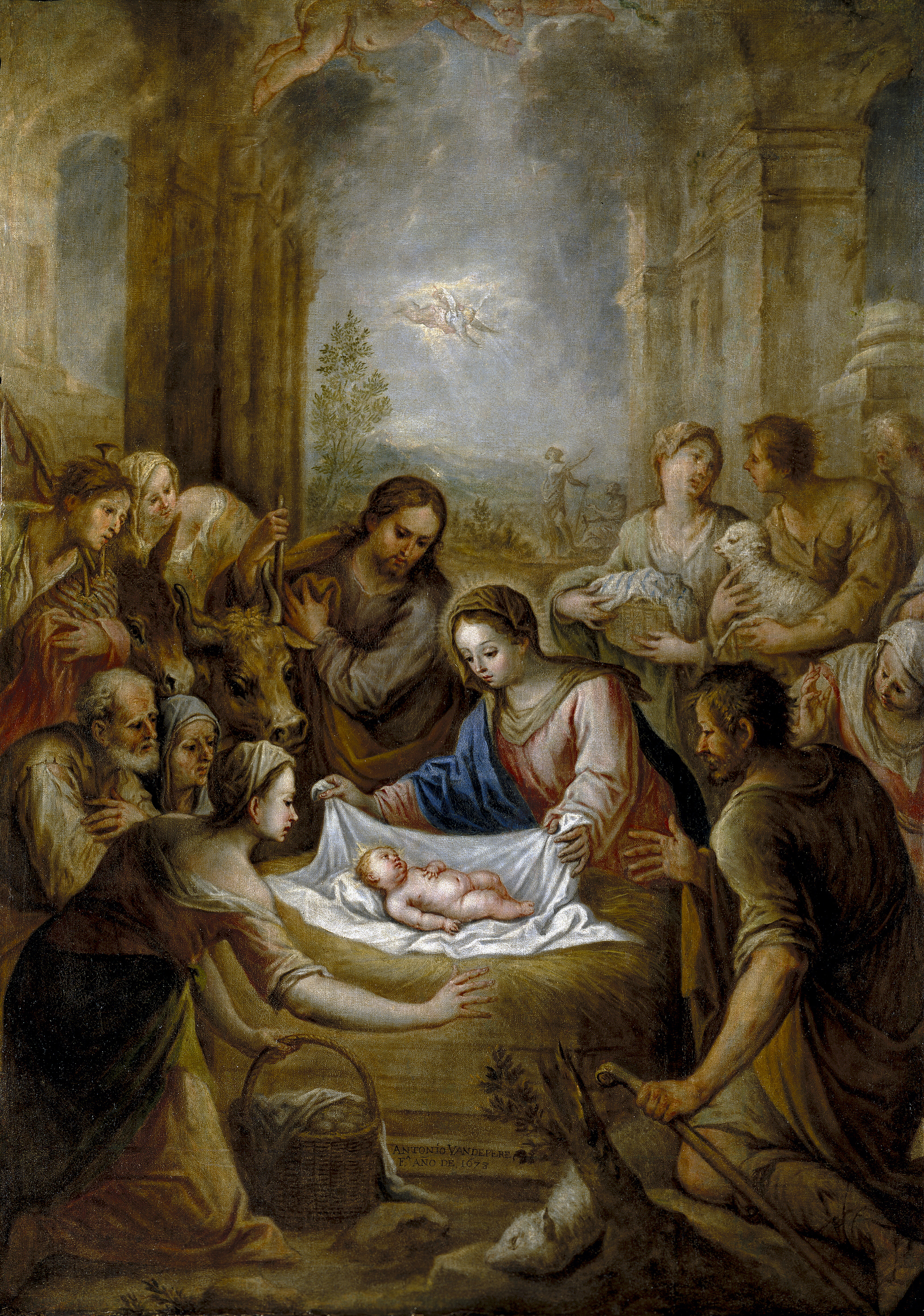 El lienzo representa el momento en que el Niño Jesús, al poco de nacer, fue adorado por unos pastores que habían sido avisados por un ángel del nacimiento del Mesías.